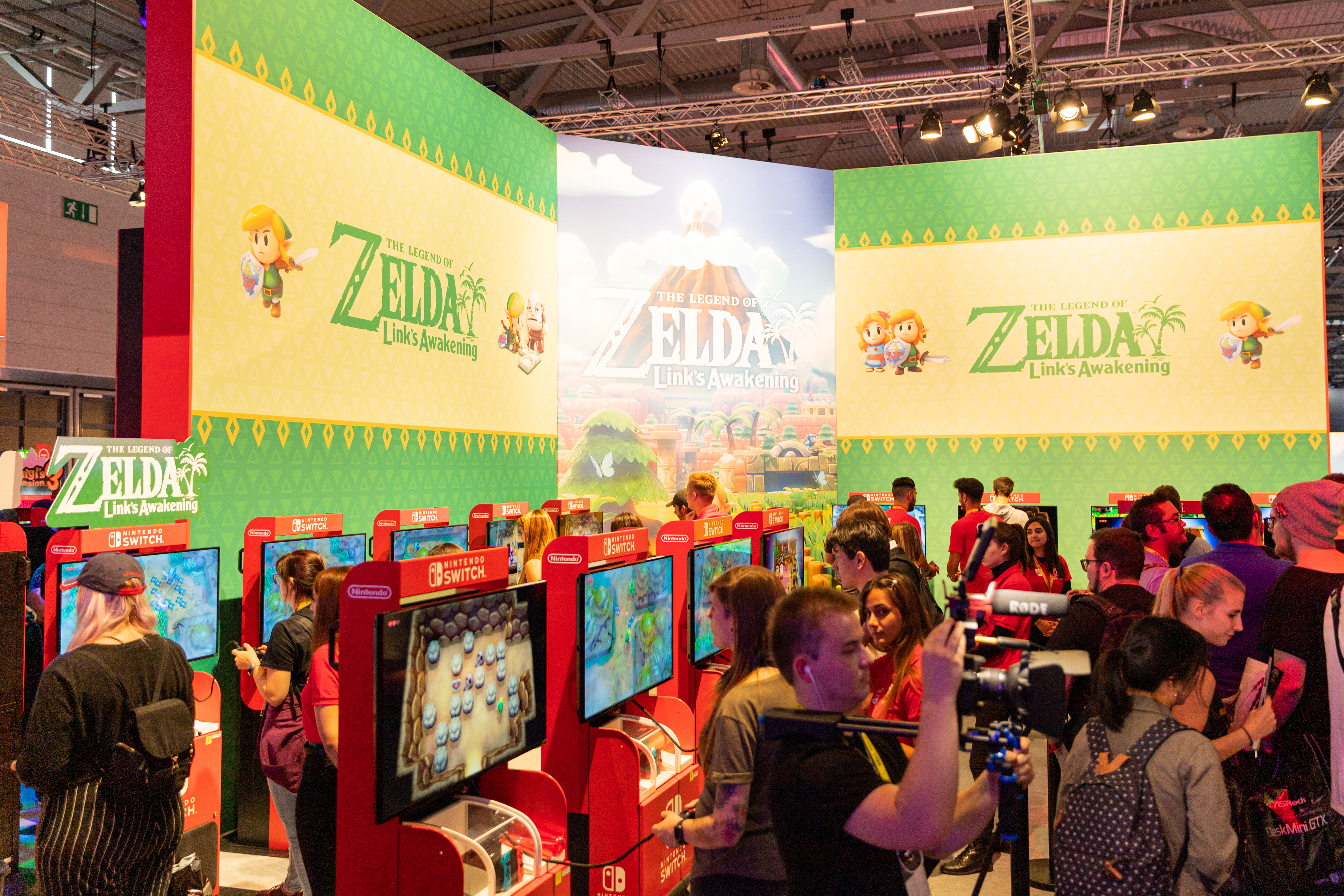 Nintendo Switch Zelda Gamescom 2019